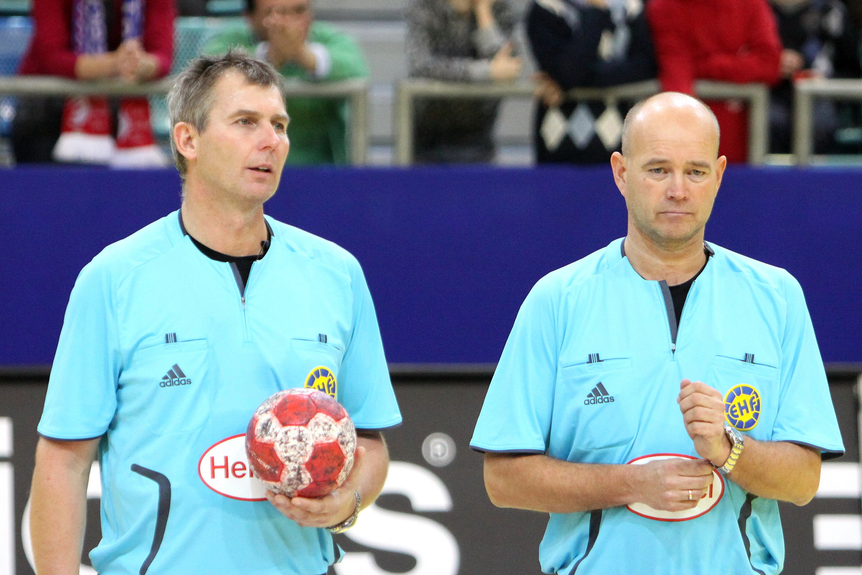 złodziejaszki